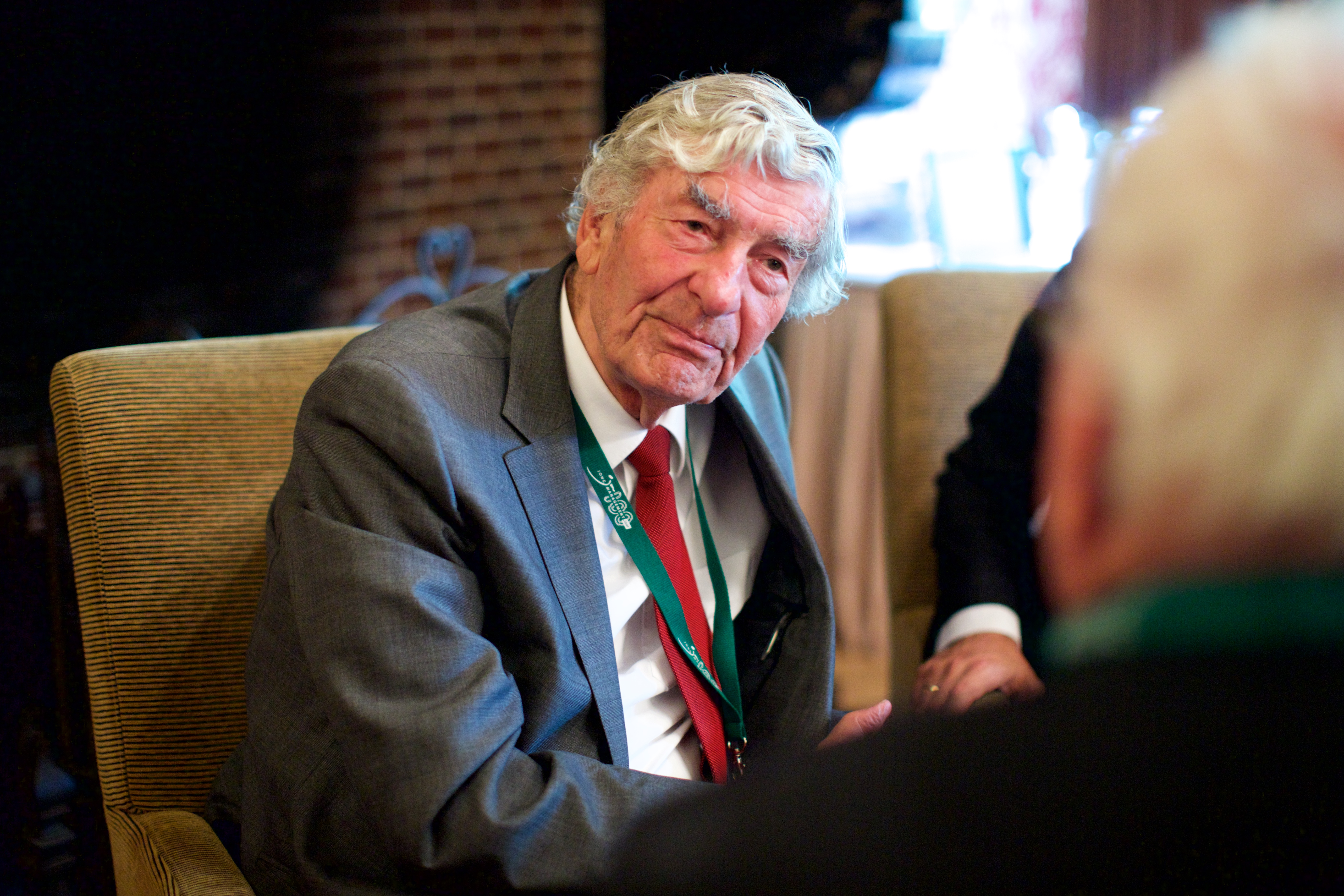 Op 10 juni 2016 vierde Jong Management haar 100 jarig jubileum in het Koninklijk Instituut Tropen in Amsterdam. Jong Management begon in 1916 als de Vereniging voor Toekomstige Katholieke Werkgevers. Nu is het uitgegroeid tot de grootste vereniging voor jonge werkgevers van Nederland. Anno 2016 komen de circa 1.000 leden van de vereniging maandelijks bijeen om elkaar te inspireren, uit te dagen, en van elkaar te leren.